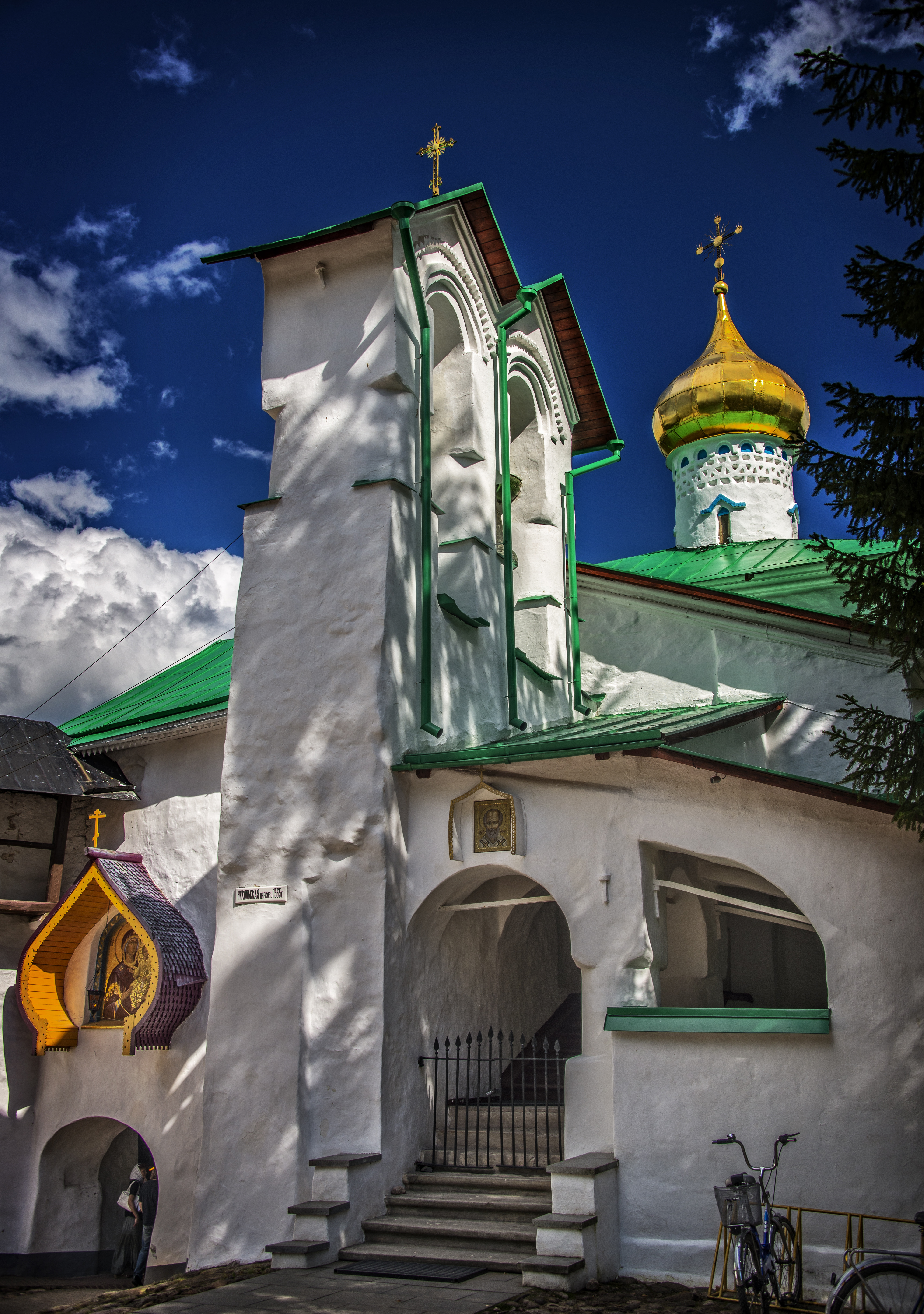 Церковь Николы Ратного, надвратная (церковь Николы Вратаря): Печоры, Печорский район, Псковская область